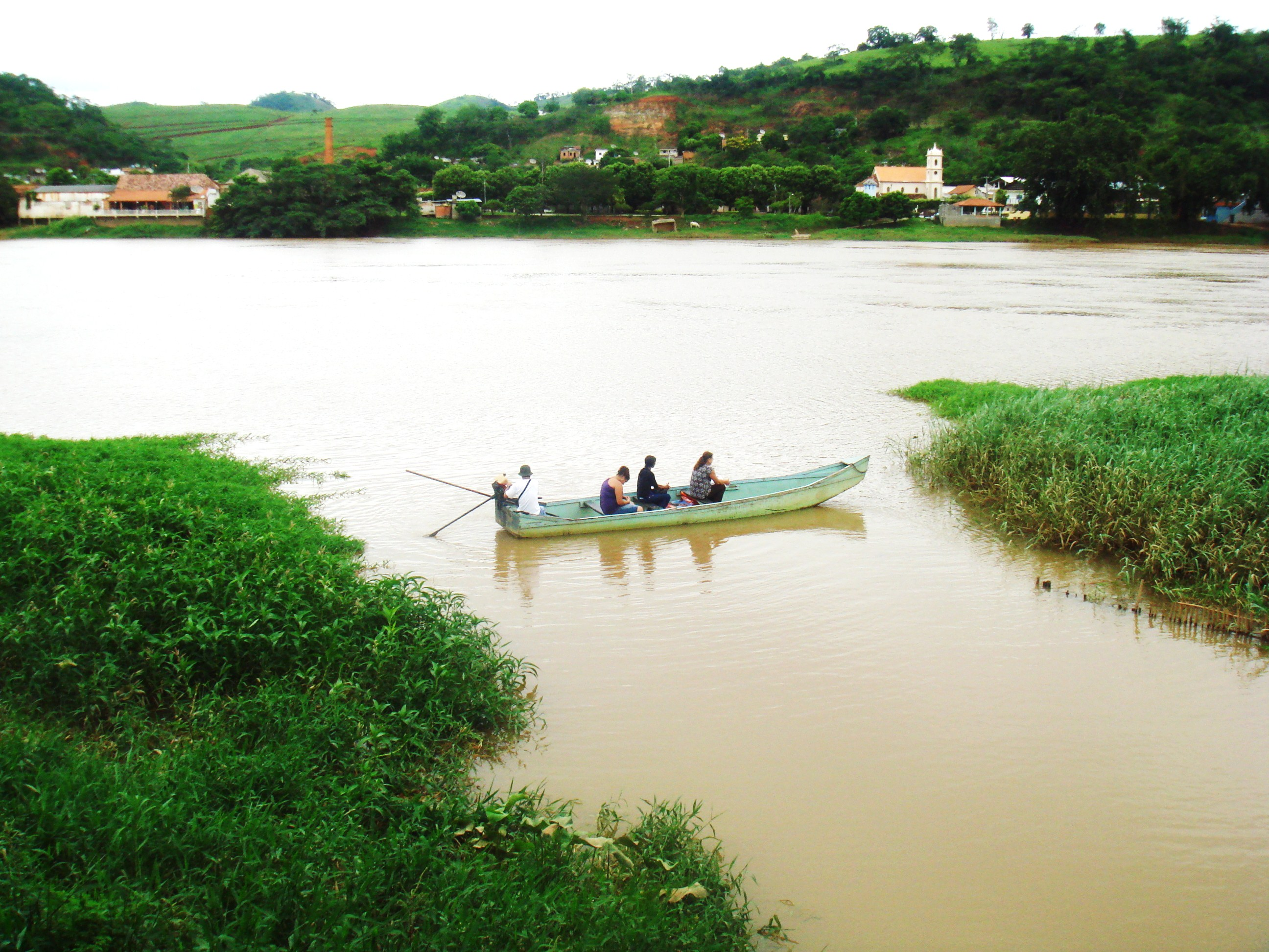 Barco atravessando o Rio Paraíba do Sul